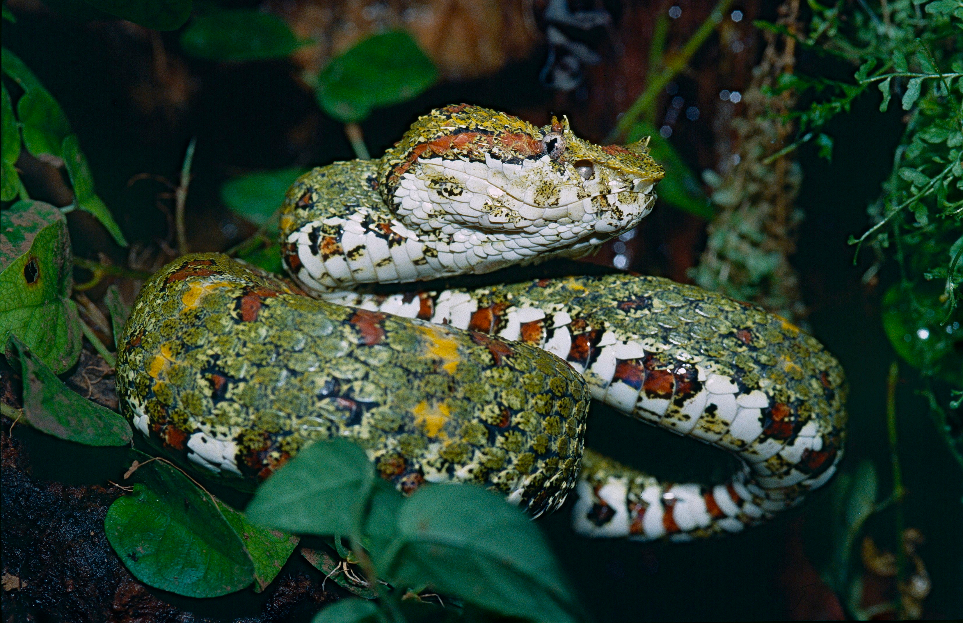 Santa Elena, Monte Verde, COSTA RICA Scanned Slide from 1997